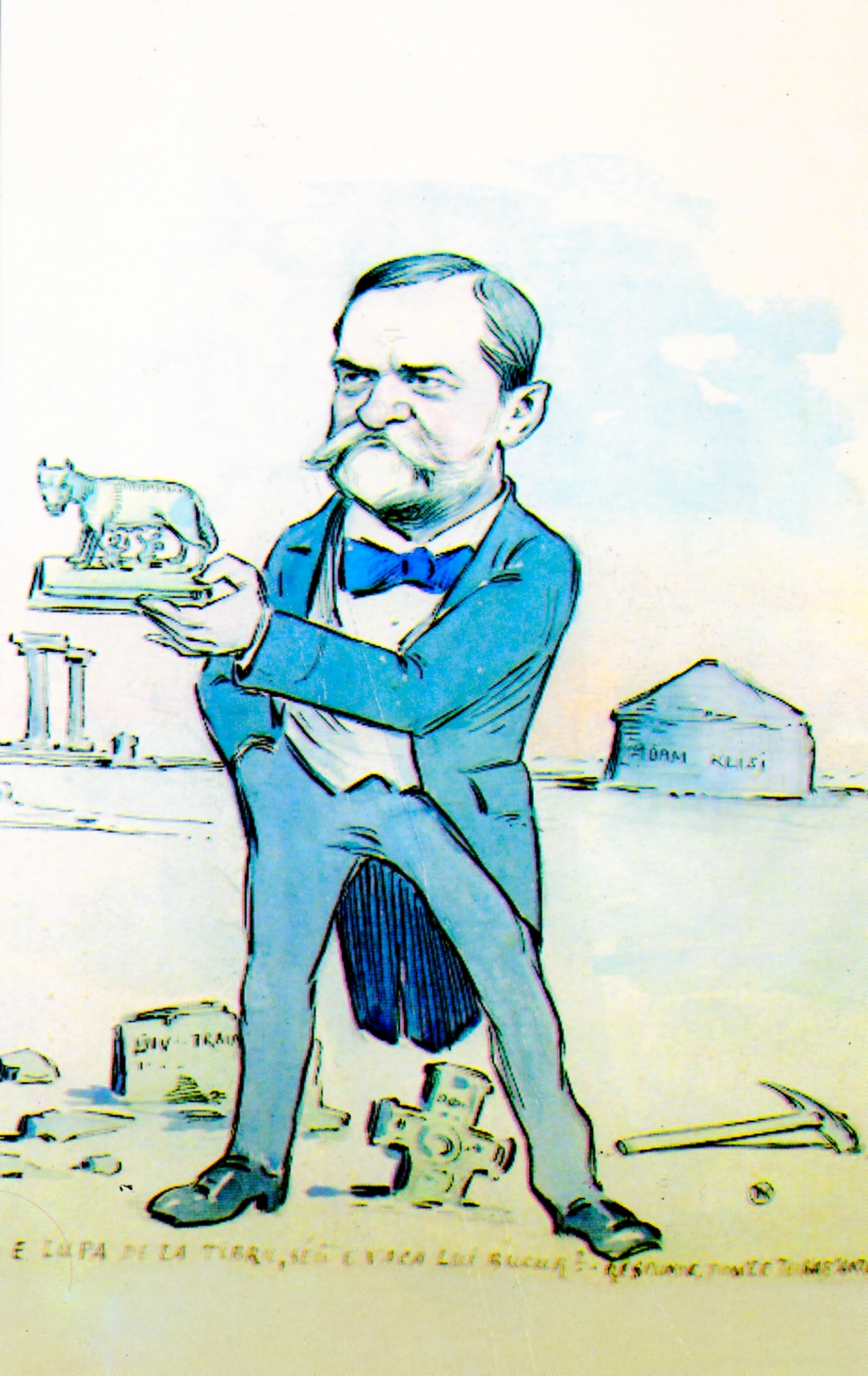 Arheologul Grigore Tocilescu. E lupa de la Tibru, sau e vaca lui Bucur? Răspunde domnule... !